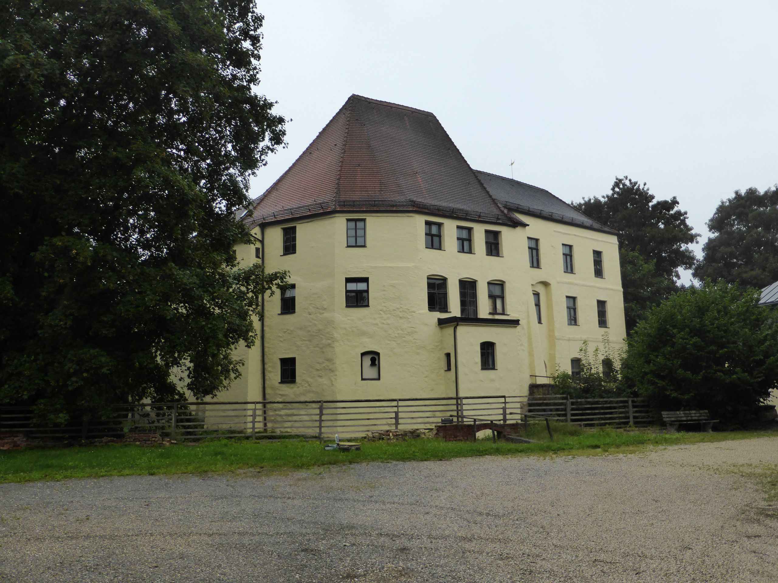 Schloss Baumgarten, Sandstr. 5, Gemeinde Dietersburg im niederbayrischen Landkreis Rottal-Inn